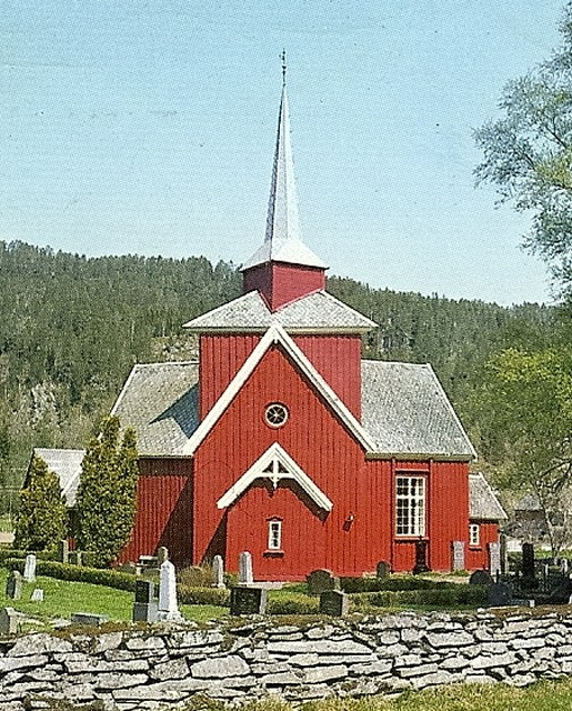 Mo kirke i Surnadal